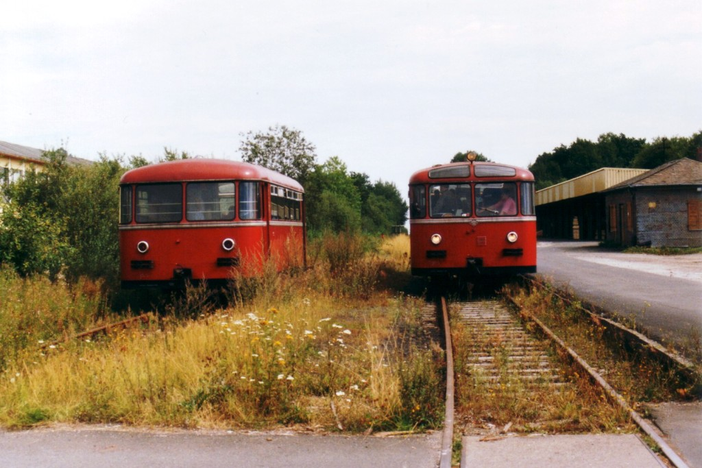 Uerdinger Schienenbus im Bahnhof Breitscheid